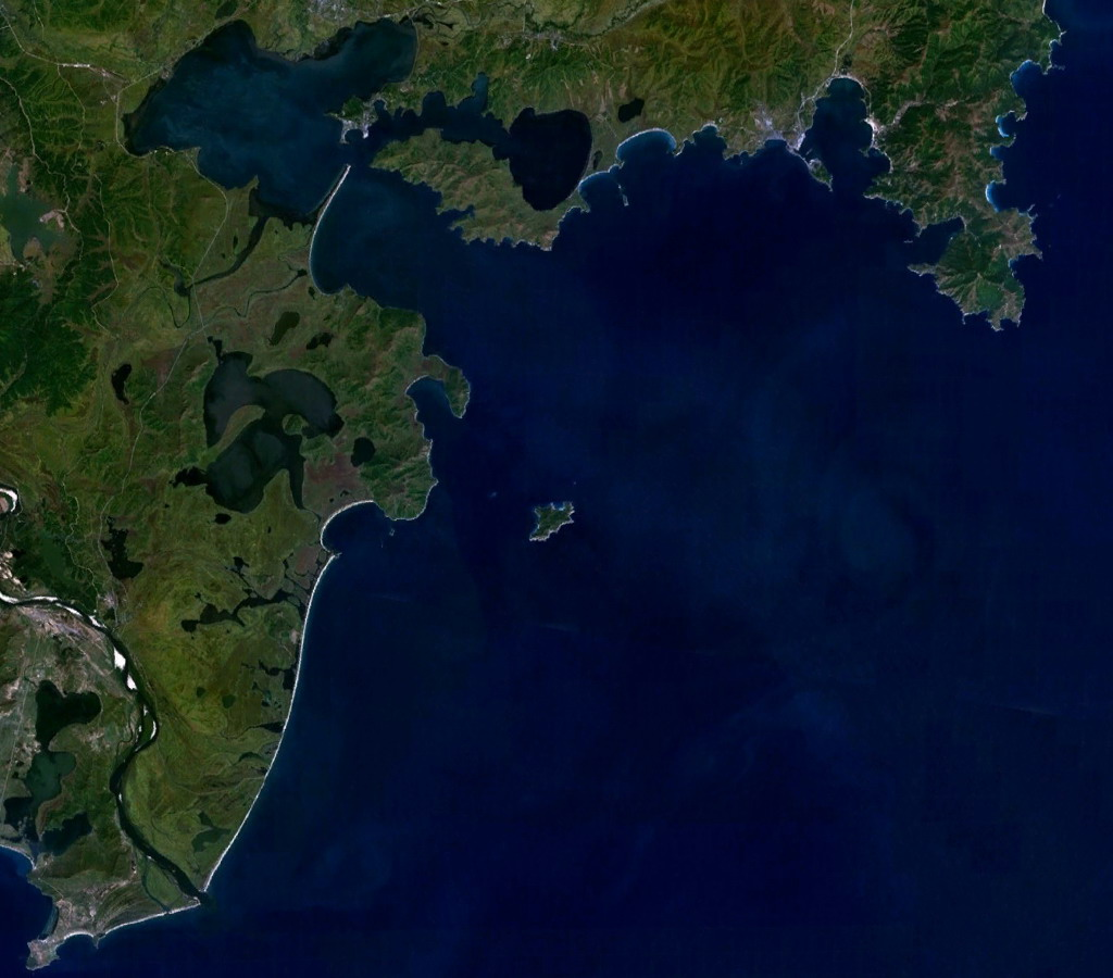 Залив Посьета и остров Фуругельма, вид из космоса